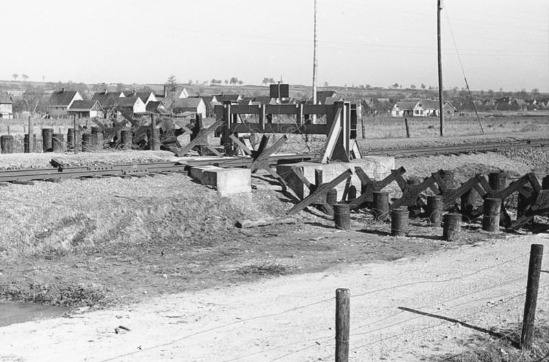 Steinfeld, 7km ostw. Weissenburg. 3.3.1940 Westwall. Eisenbahnsperre, bestehend aus Stahlschranke, Rammpfählen und Tschechen-Igel. Hessesfilmstelle, Bildberichter: Lohmeyer